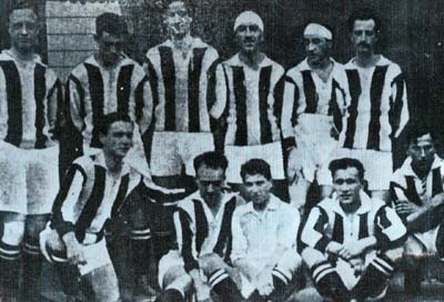 Una formazione della Juventus nella stagione 1919-20.